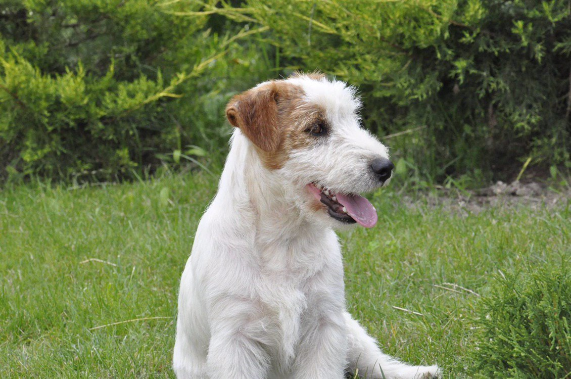 שיער זיפי